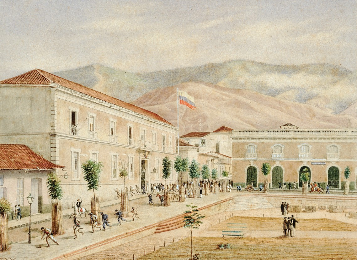 Ramón Bolet Peraza Caracas, Casa de Gobierno, Plaza Bolívar, 1870 Acuarela sobre papel 39,6 x 47,3 cm. Galería de Arte Nacional, Caracas – Venezuela.